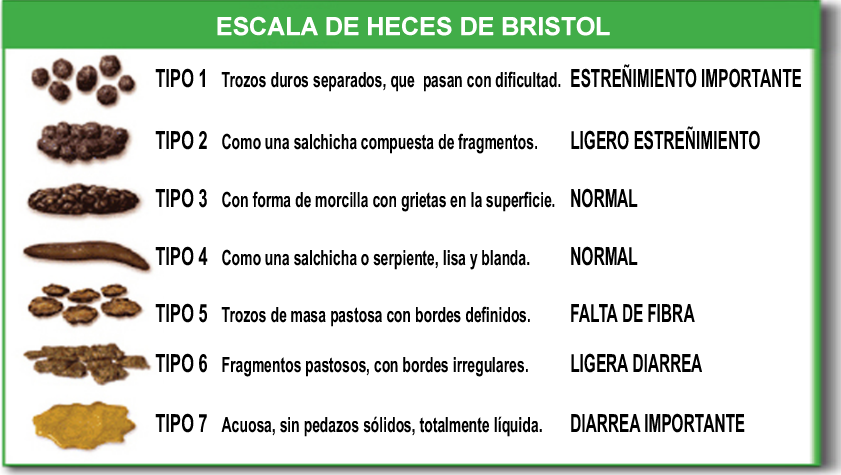 La escala de heces de Bristol se utiliza para clasificar las heces en función de su apariencia.